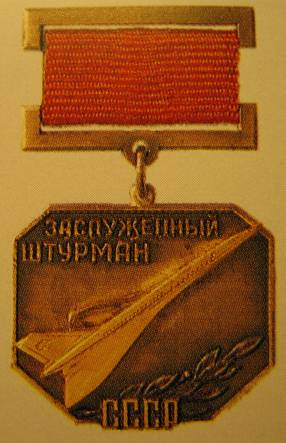 Знак «Заслуженный штурман СССР»